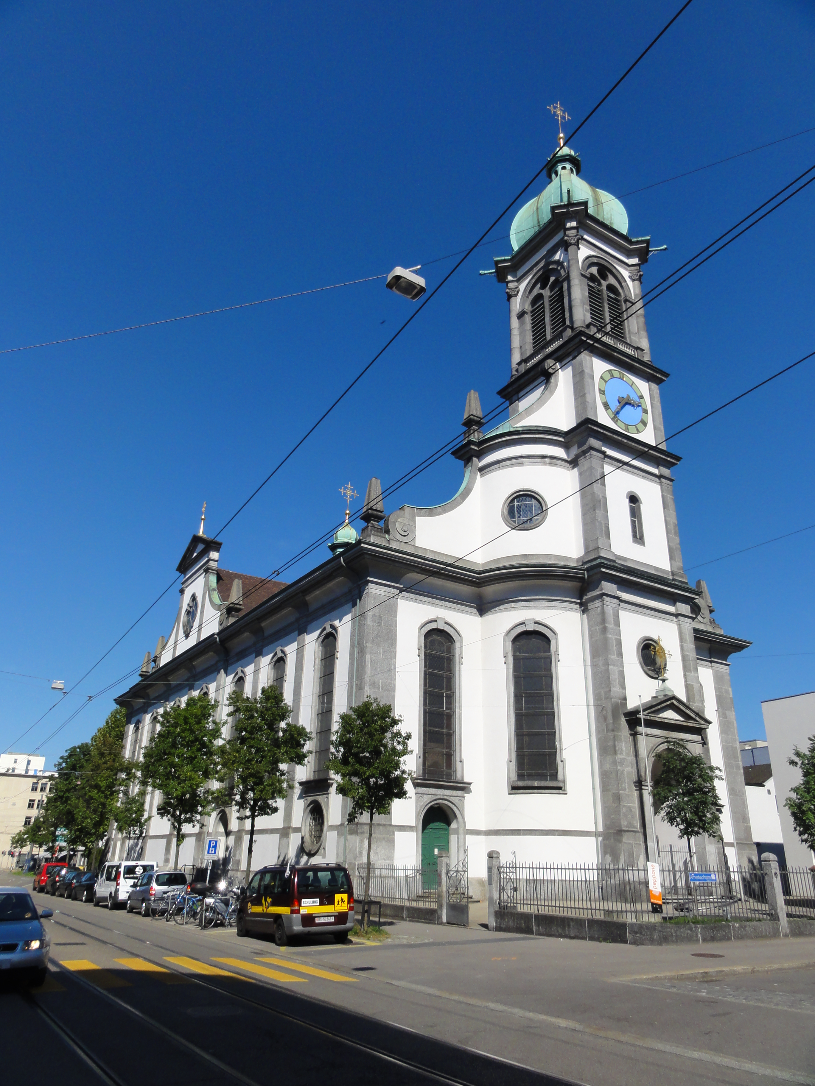 Basel Stadt (Amerbachstrasse 9) — Josephskirche, Aussenansicht EXIF data with GPS coordinates and magnetic direction. GPS data may be inaccurate.